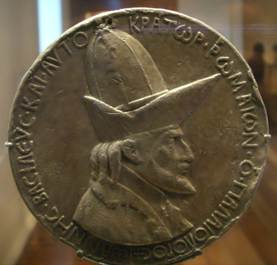 National gallery in washington d.c., pisanello, medaglia di giovanni di bisanzio recto